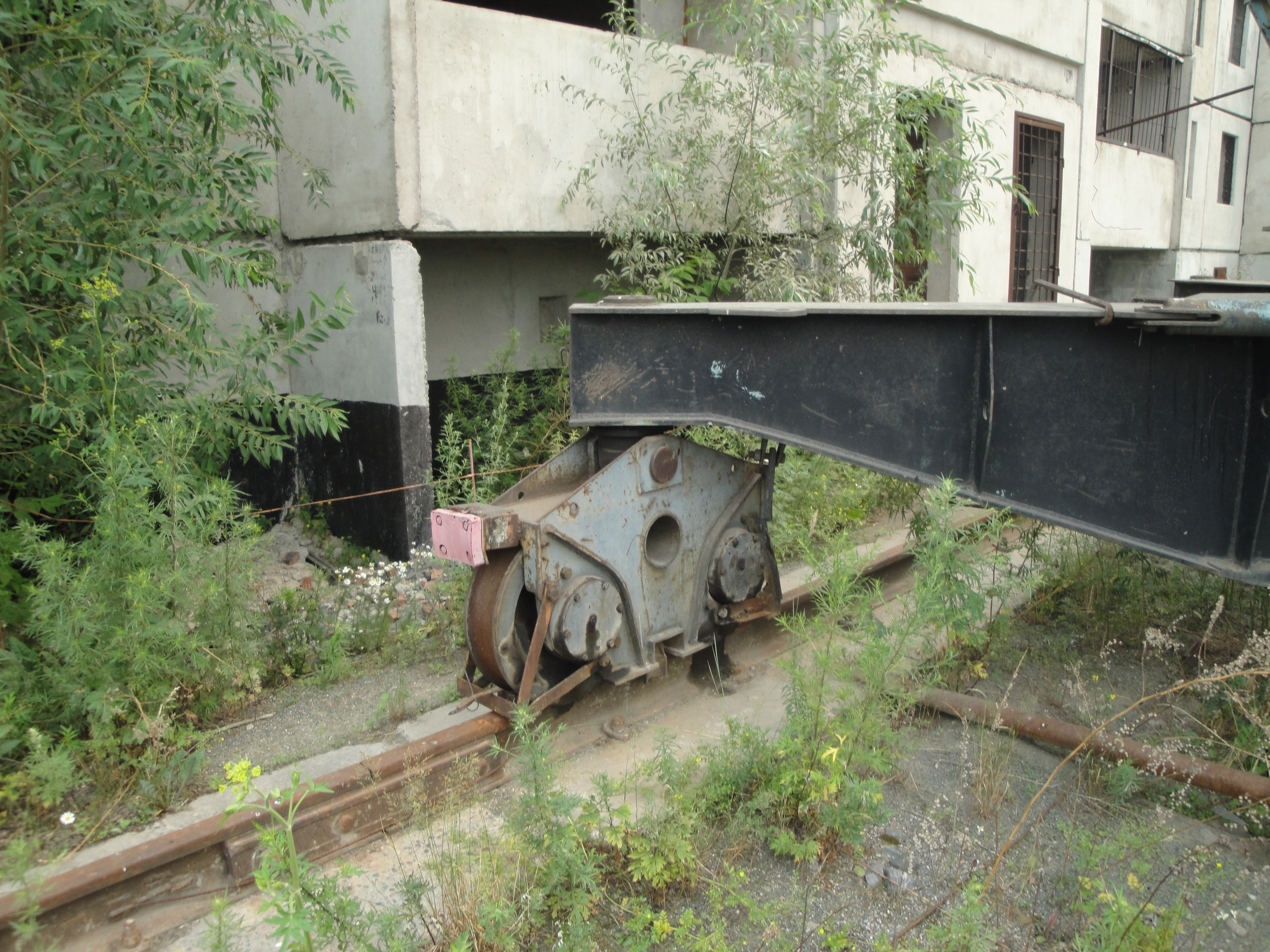 Башенный кран КБ-405 на строительстве жилого дома. Новосибирск, ул. Волховская 33в стр. Ходовая тележка на рельсе